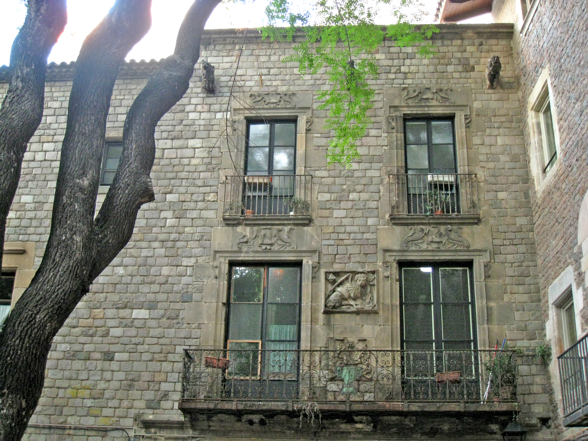 Casa del Gremi dels Sabaters, avui Museu del Calçat, a la plaça de Sant Felip Neri, al barri Gòtic de Barcelona. La façana d'aquest edifici fou traslladada de l'edifici original del 1565 quan fou enderrocat per obrir l'avinguda de la Catedral. El lleó de la façana és el símbol de sant Marc, patró del gremi.